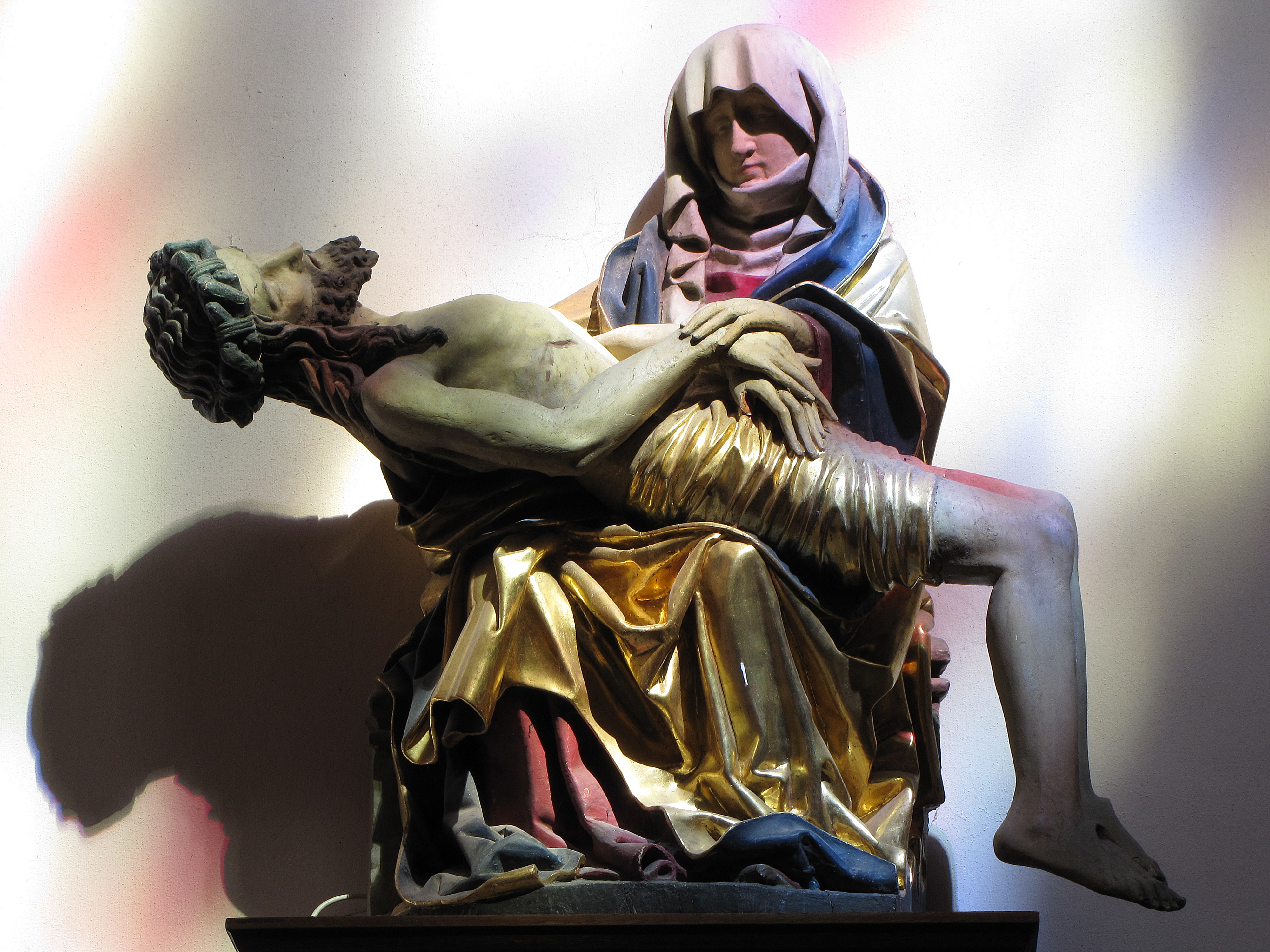 Alsace, Haut-Rhin, Église Saint-Martin (1869) d'Ensisheim (IA00074211)Vierge de Pitié (XVIe): This object is classé Monument Historique in the base Palissy, database of the French furniture patrimony of the French ministry of culture, under the references PM68000519 and IM68001754.